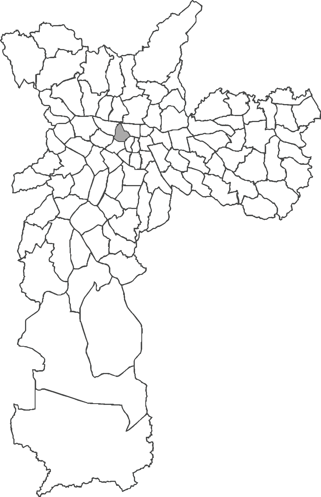 Localização do distrito de Santa Cecília no município de São Paulo.